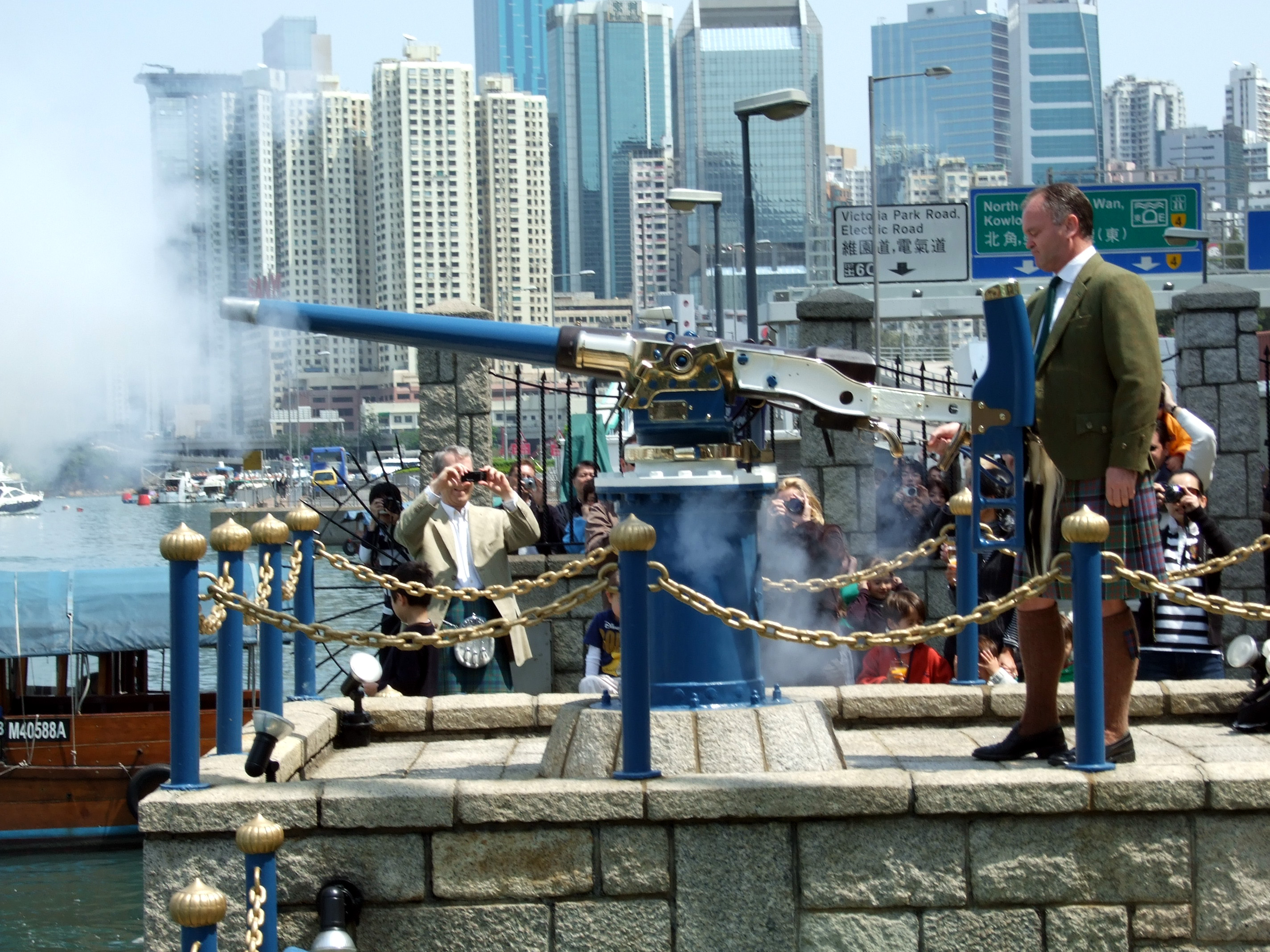 中文（香港）: 怡和午炮鳴炮